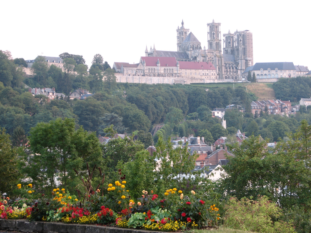 Laon, département de l'Aisne, Picardie, France. On remarque : . (A la date de l'import depuis Flickr par Marc ROUSSEL, l'auteur avait légendé sa photo ainsi : "...")